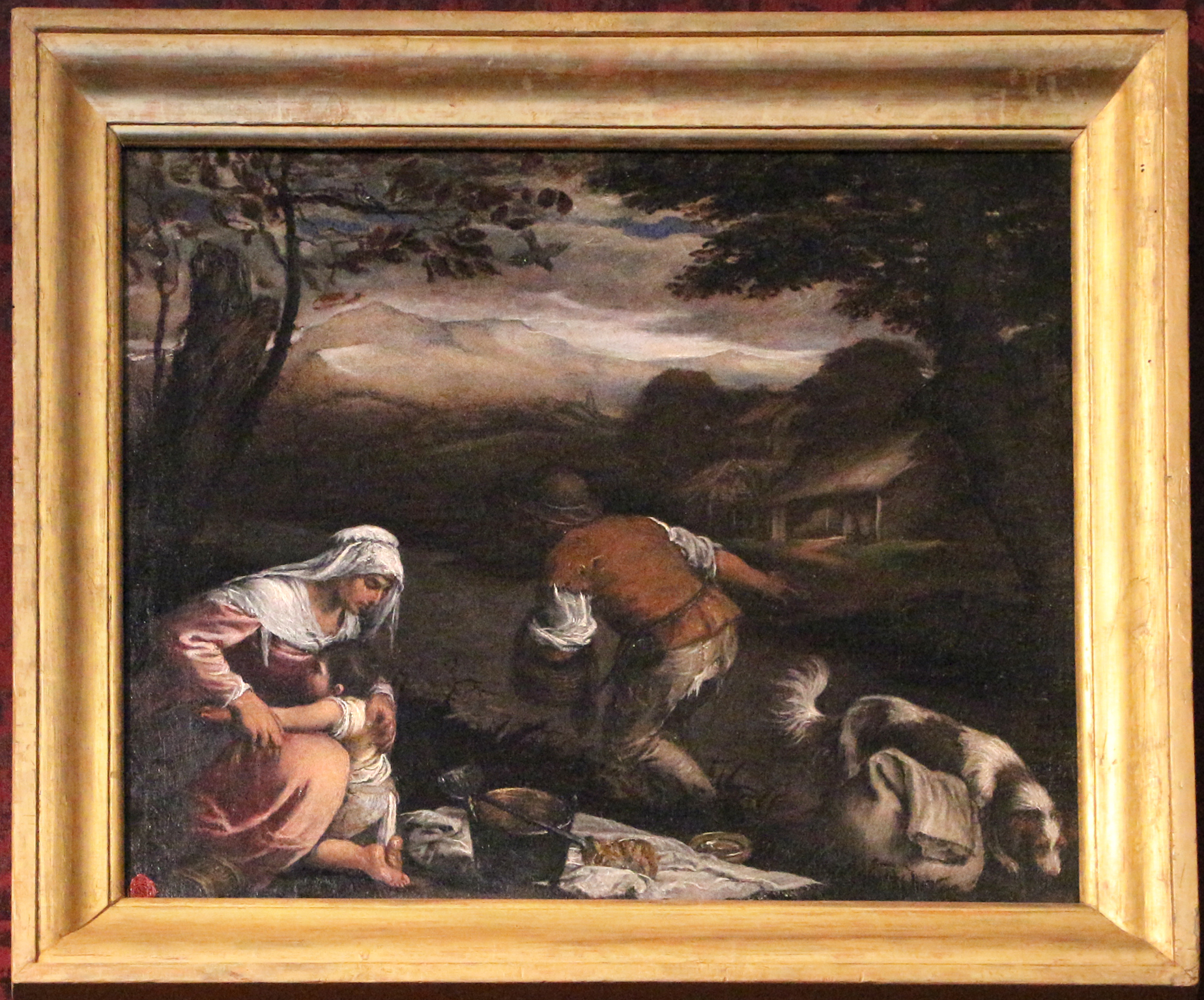 Gallerie dell'Accademia This is a photo of a monument which is part of cultural heritage of Italy.